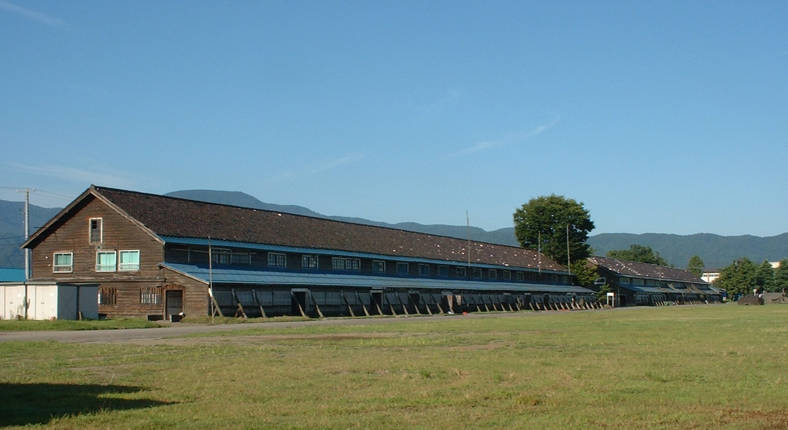 高田駐屯地で宿泊した際に見かけた倉庫 現存していません